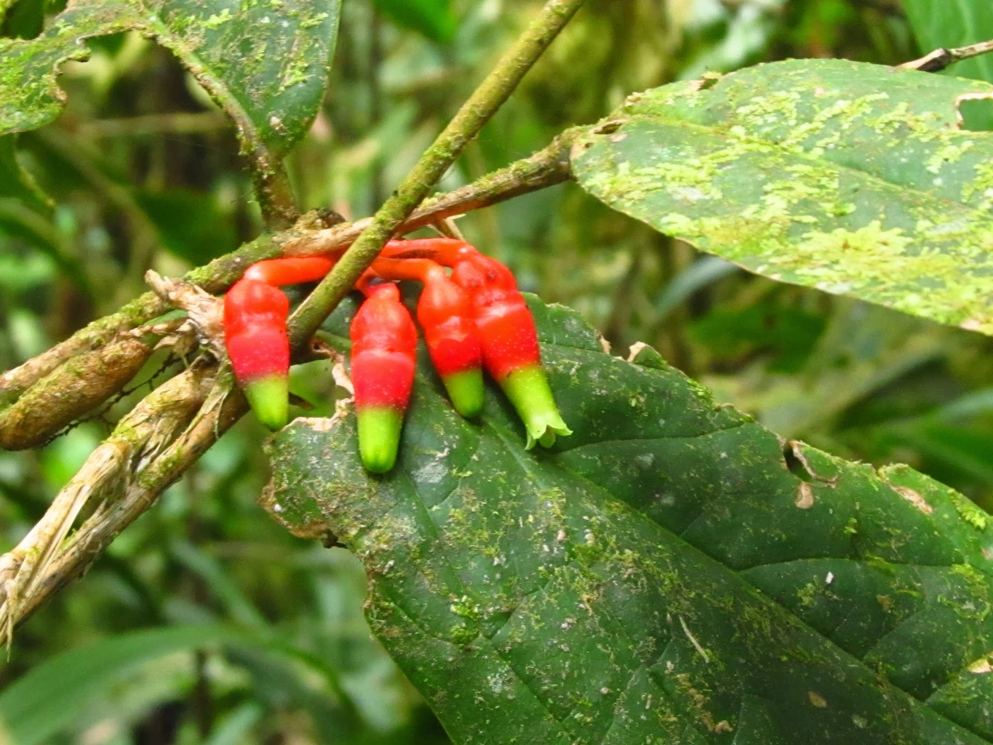 Ericaceae Psammisia sodoroi (4)